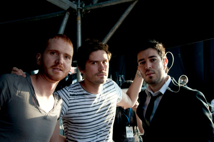 SADL EN EL BACKSTAGE DEL CONCIERTO NIVEA 100 AÑOS. 2010 PARQUE SIMÓN BOLÍVAR, BOGOTÁ COLOMBIA